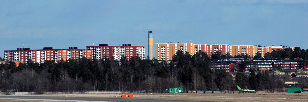 Akalla a suburb of Stockholm